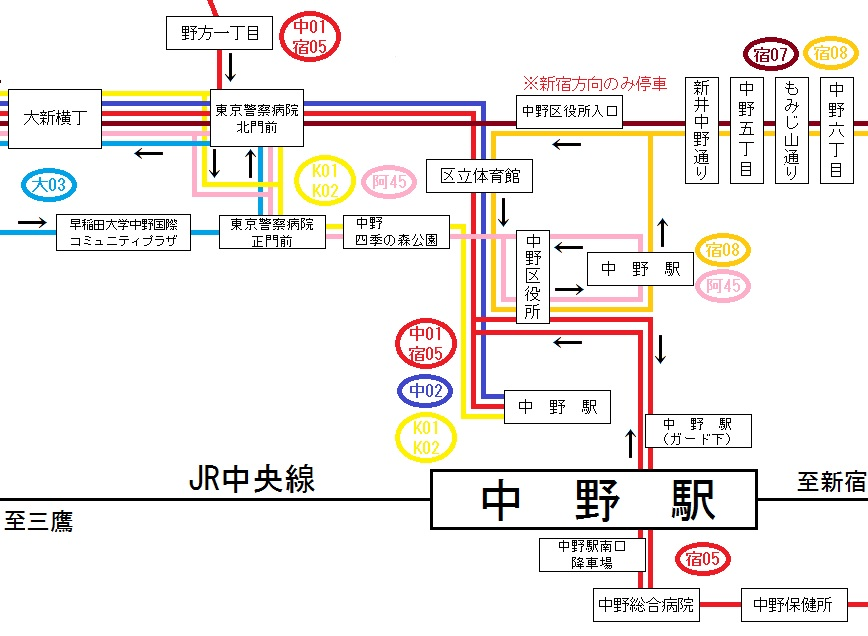 関東バス阿佐谷営業所・中野駅周辺経路図（修正版）